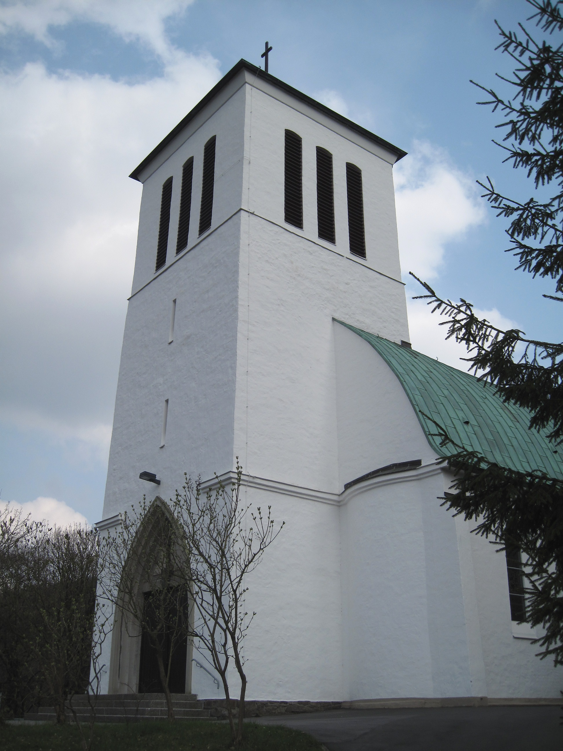 Katholische Kirche St. Petrus Canisius im Stadtteil Westig in Hemer.